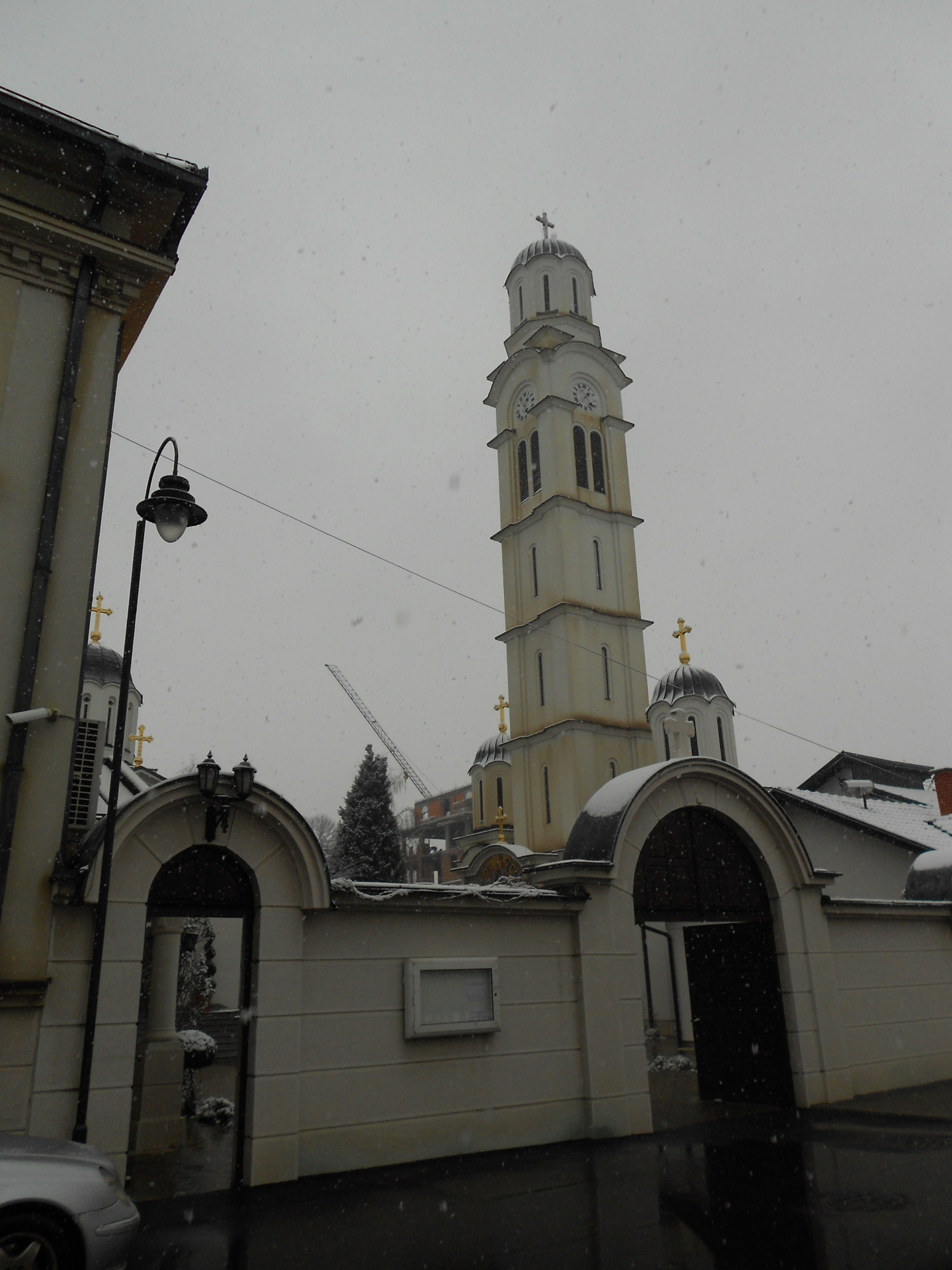 Манастир Светог Василија Острошког